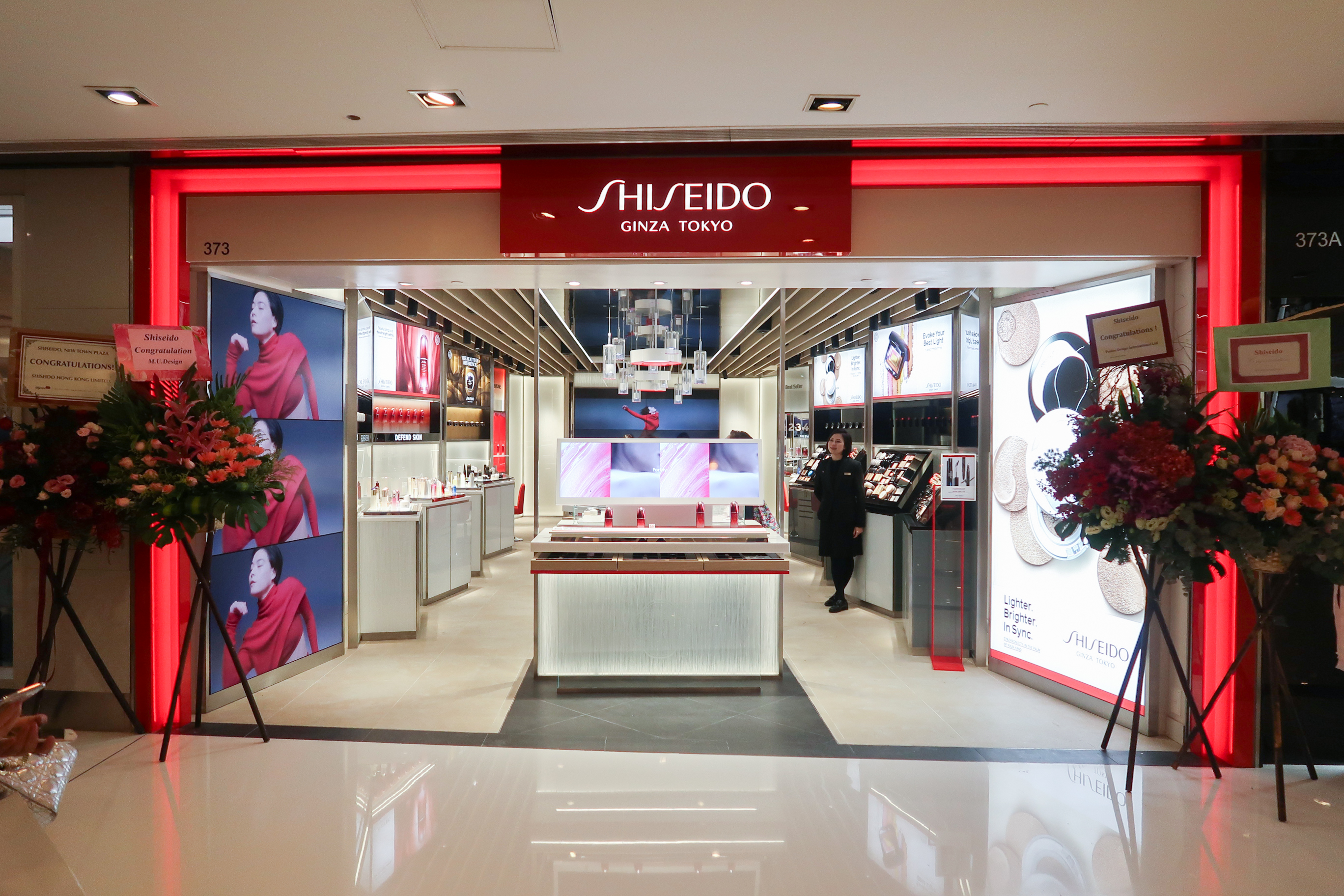 Shiseido Store in Hong Kong